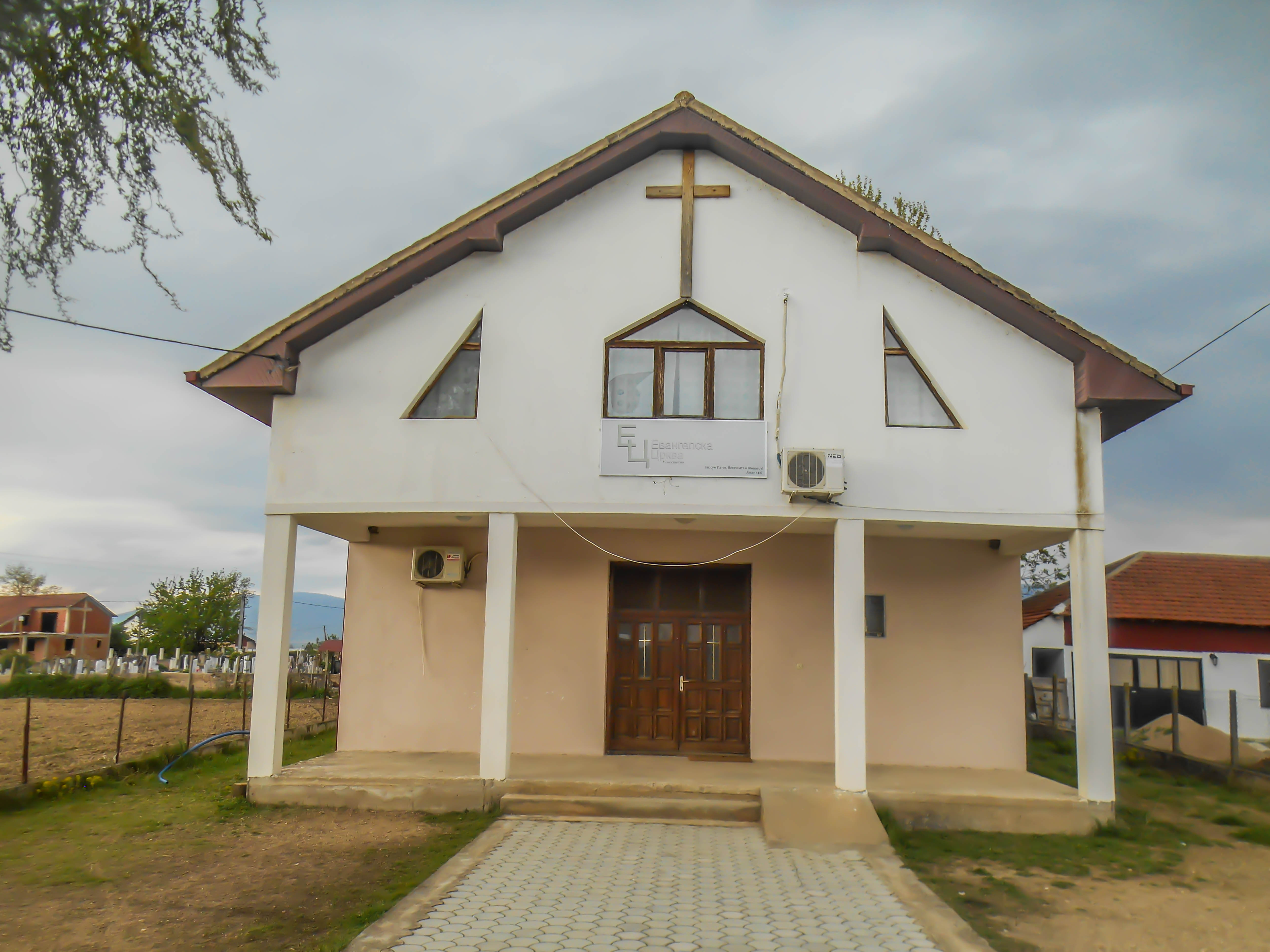 Евангелска црква - Моноспитово